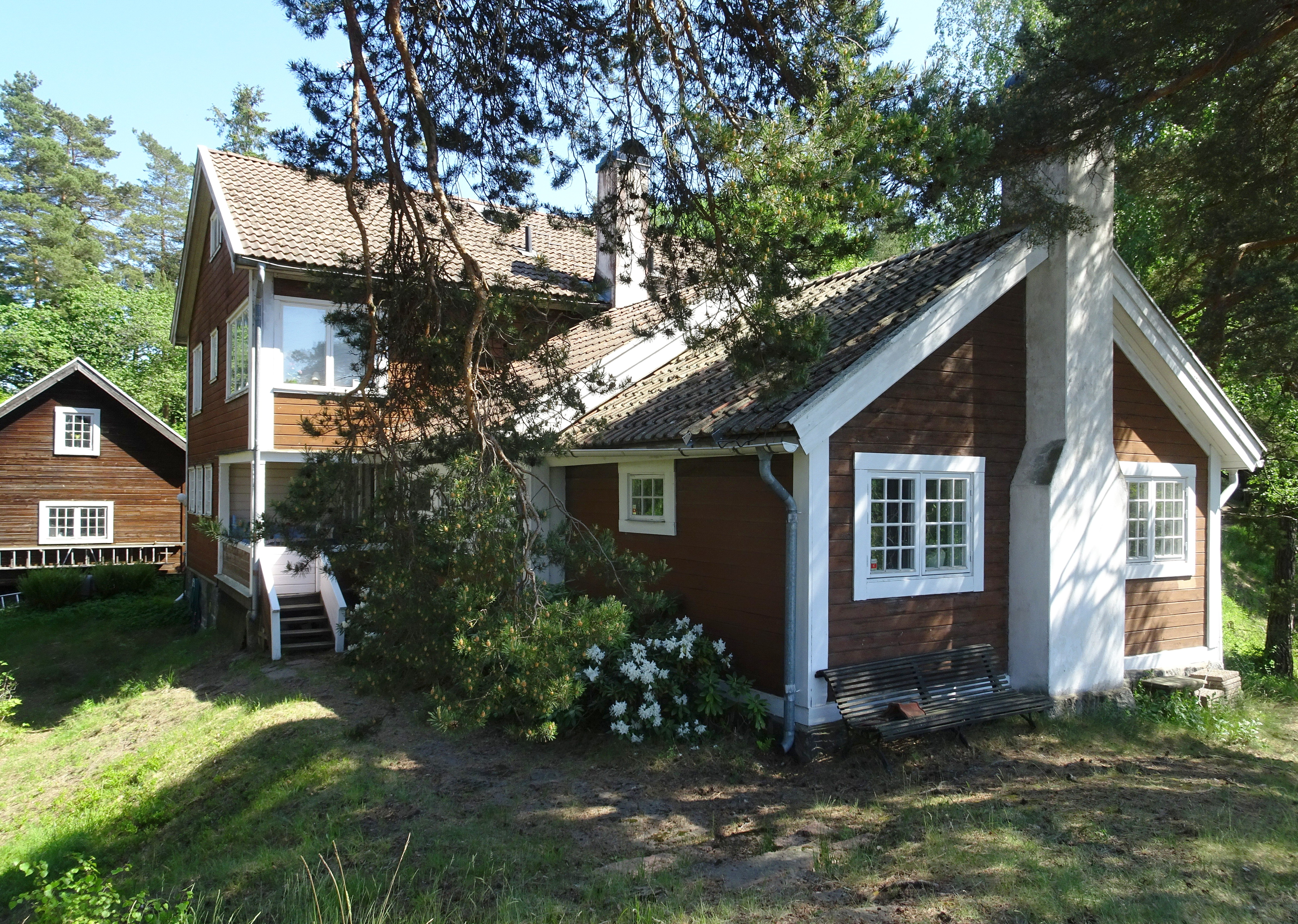 Villa Kikut, Alice Tegnérs hem mellan 1912 och 1926